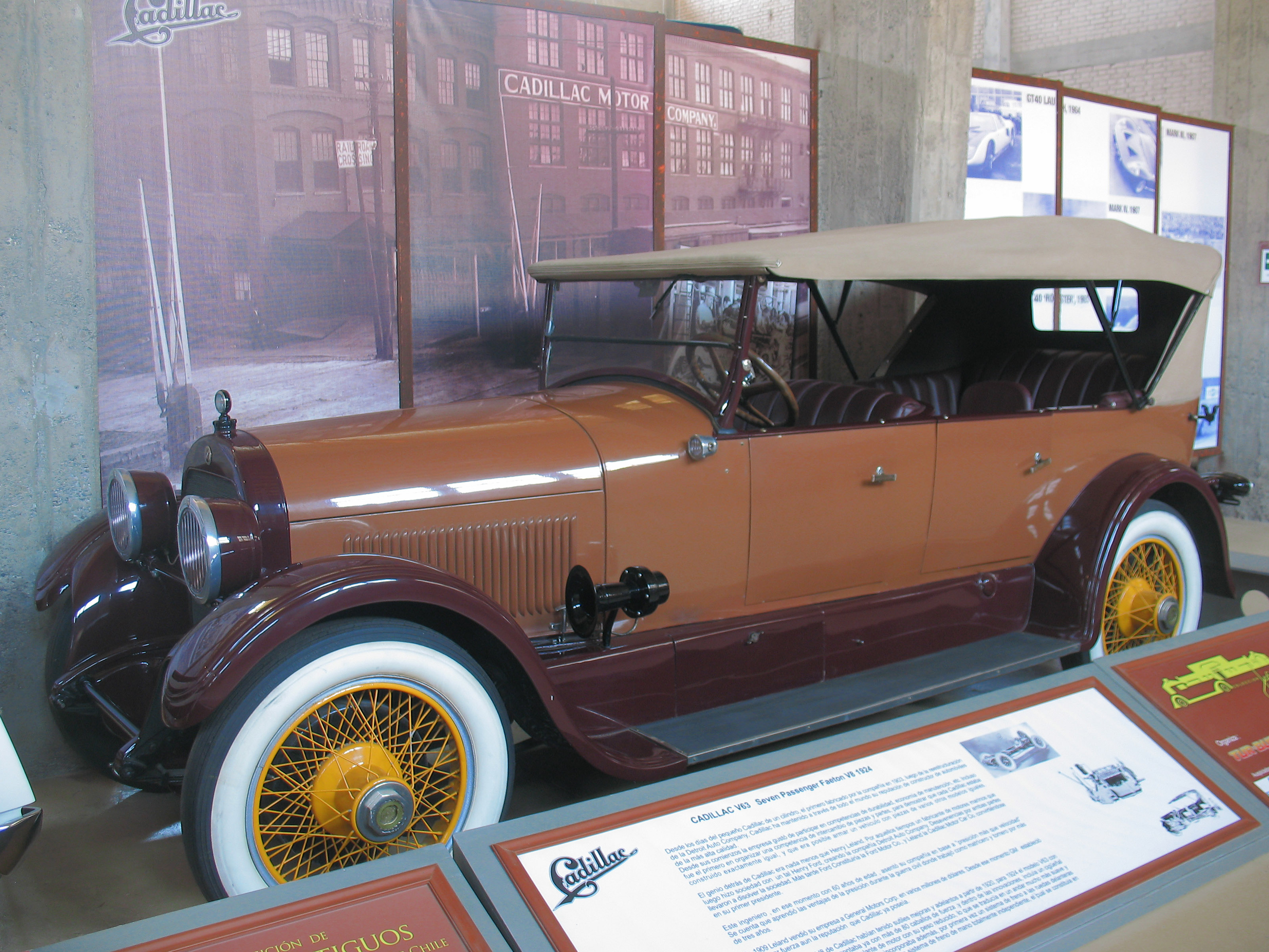 Cadillac Type V-63 Phaeton 1924